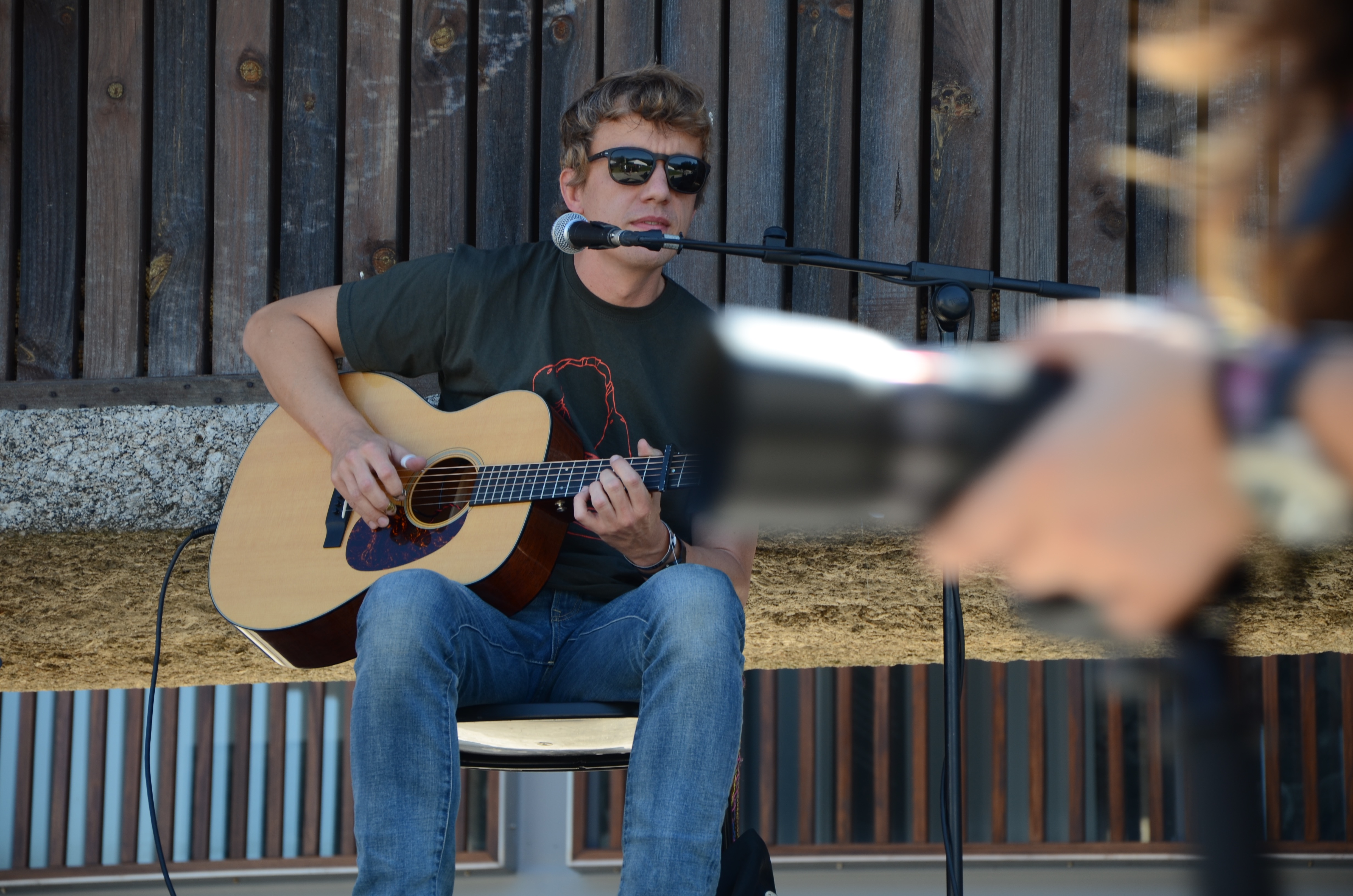 Steve Gunn